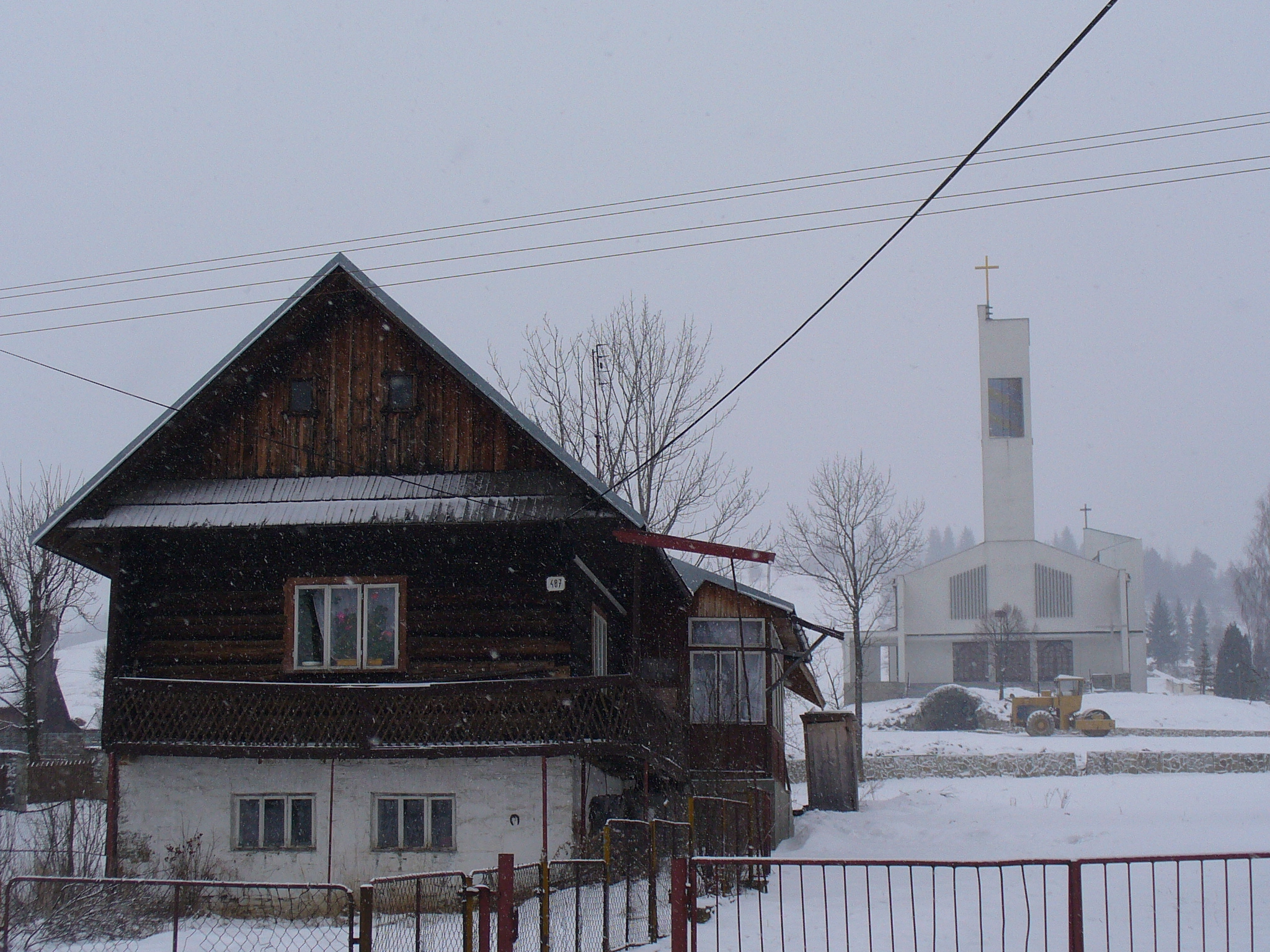 Oravská Polhora (Orawska Półgóra) w zimie. Drewniany dom góralski i nowy kościół